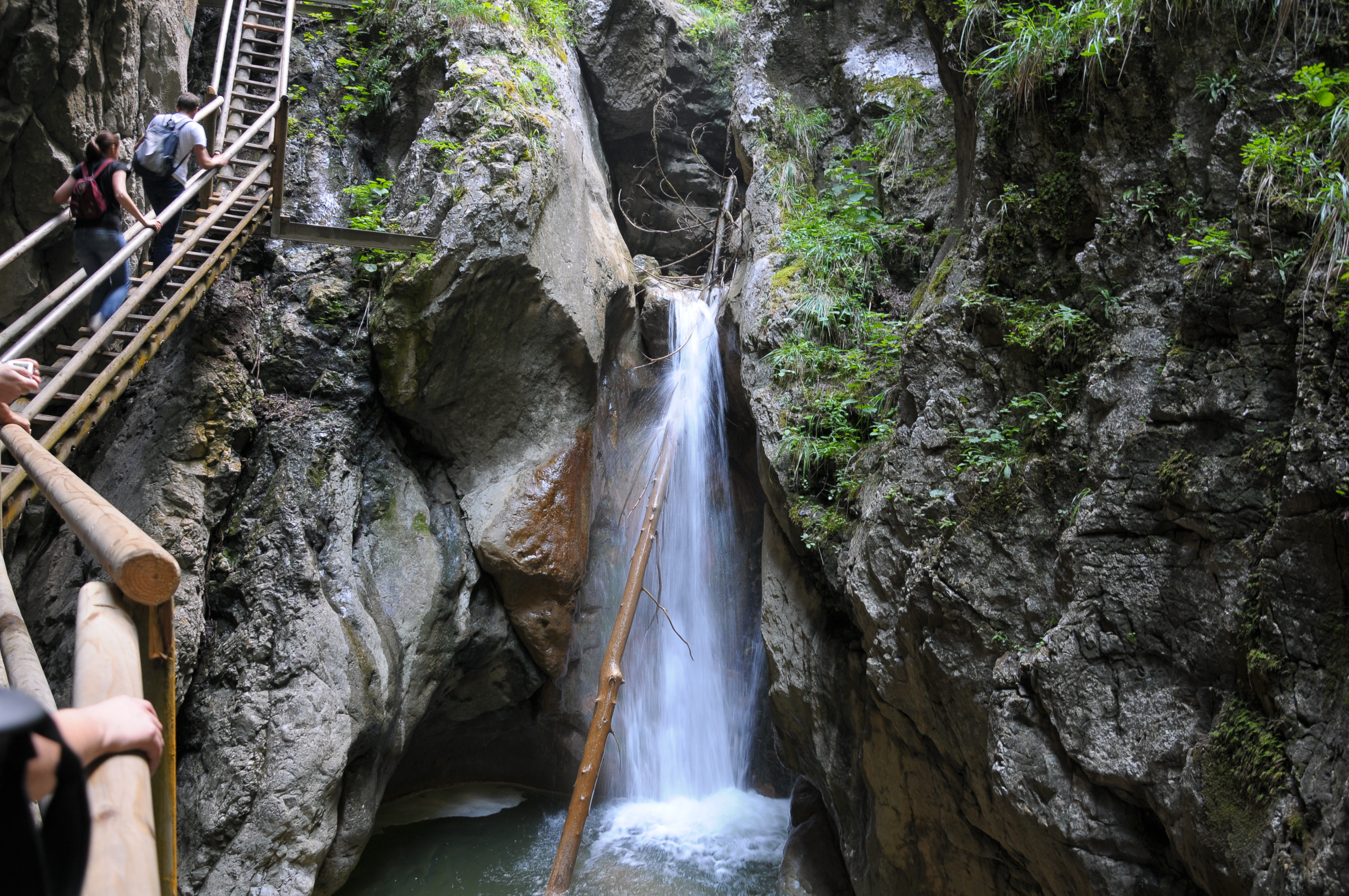 Bärenschützklamm Wanderung am 31.08.2013 Taggeszeit 13:00; Wetter: Sonnig-Bewölkt Dieser Wasserfall ist beim Durchschreiten der Klamm per Steiganlage zirka mittig gelegen. Zirka 1½ Stunden Gehzeit vom Ausgangsort der Wanderung Mixnitz entfernt. This media shows the natural monument in Styria with the ID 395.